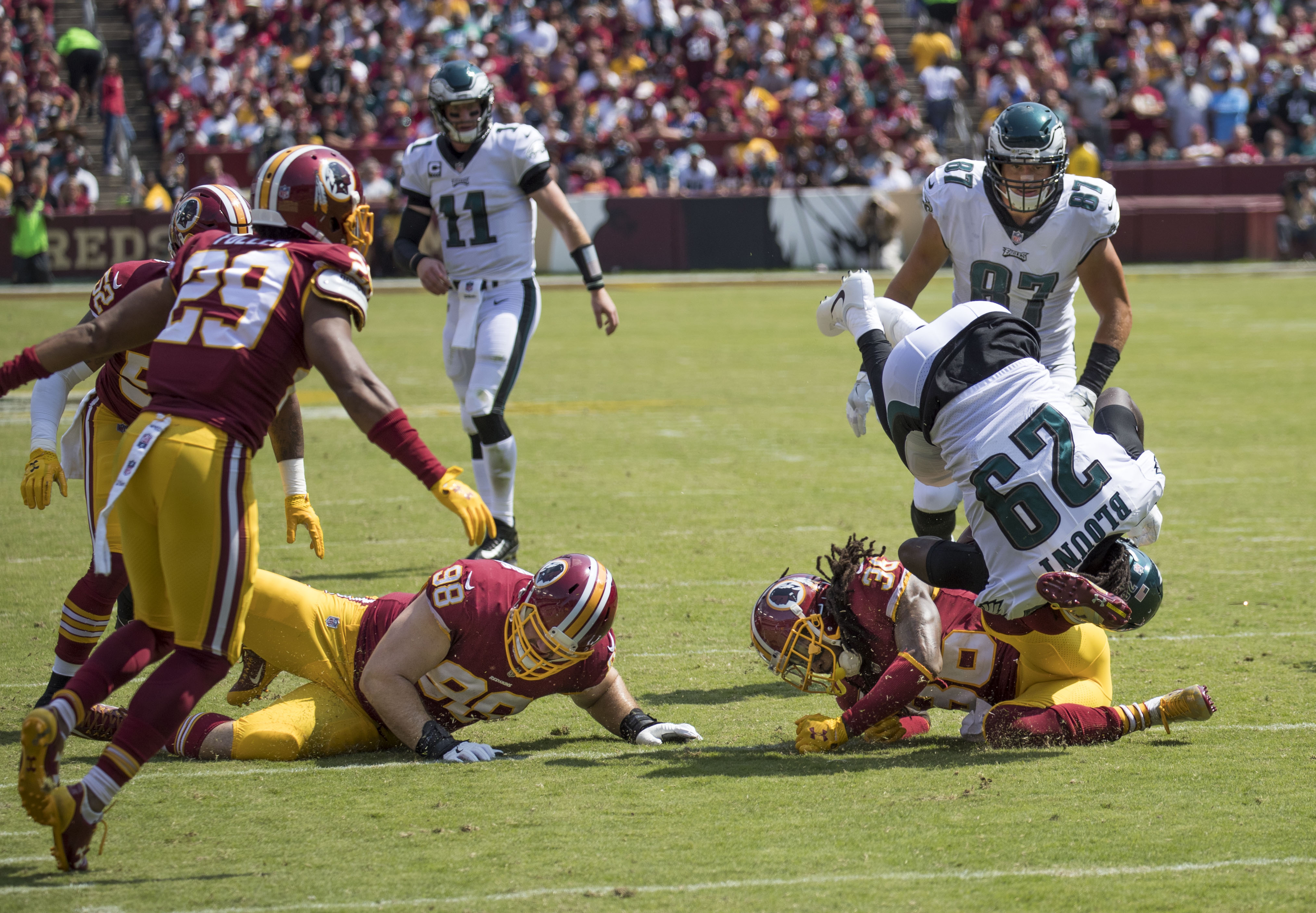 Eagles at Redskins 9/10/17